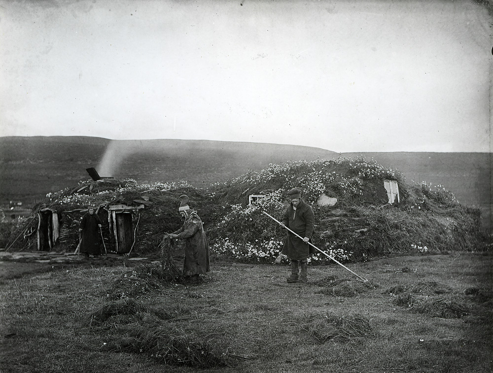 Wessel, Ellisif Rannveig Høytørke. To kvinner og en mann fotografert foran en felles torvgamme. Vestre Jakobeselv, Nesseby sogn. 1900. NMFF.002157